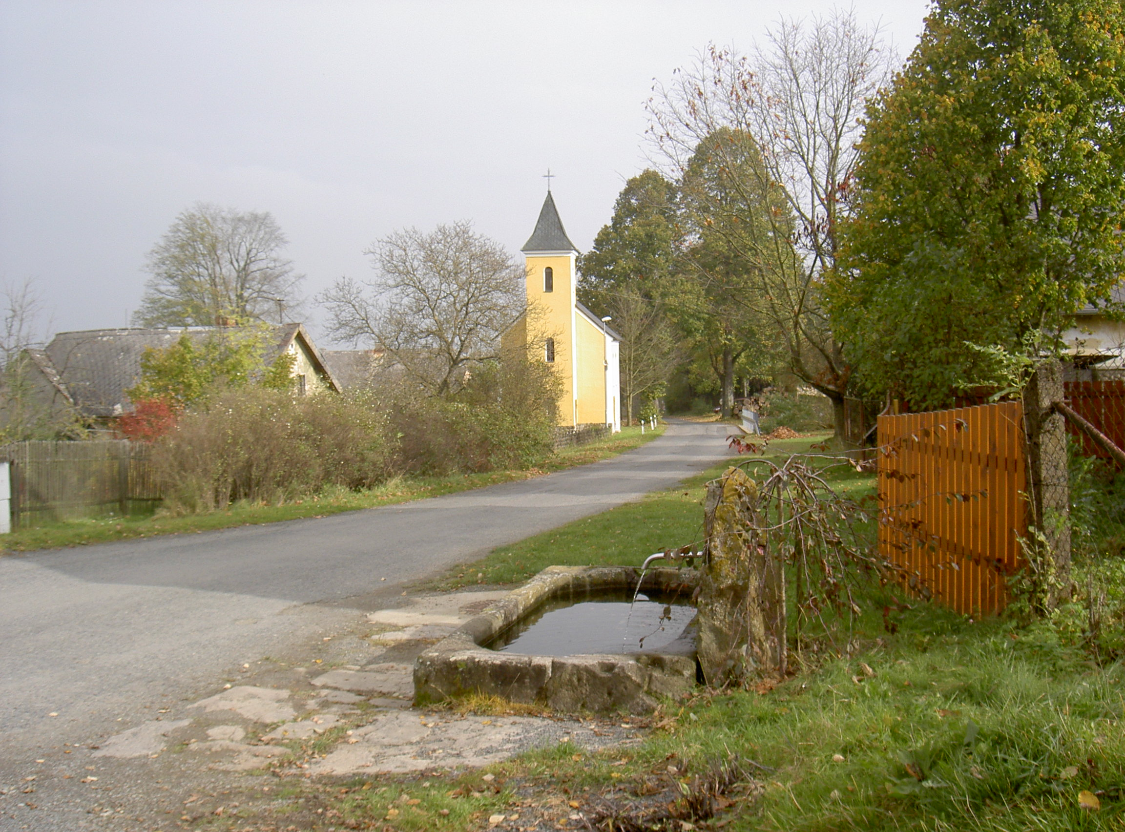 Vranov (Mnichov)